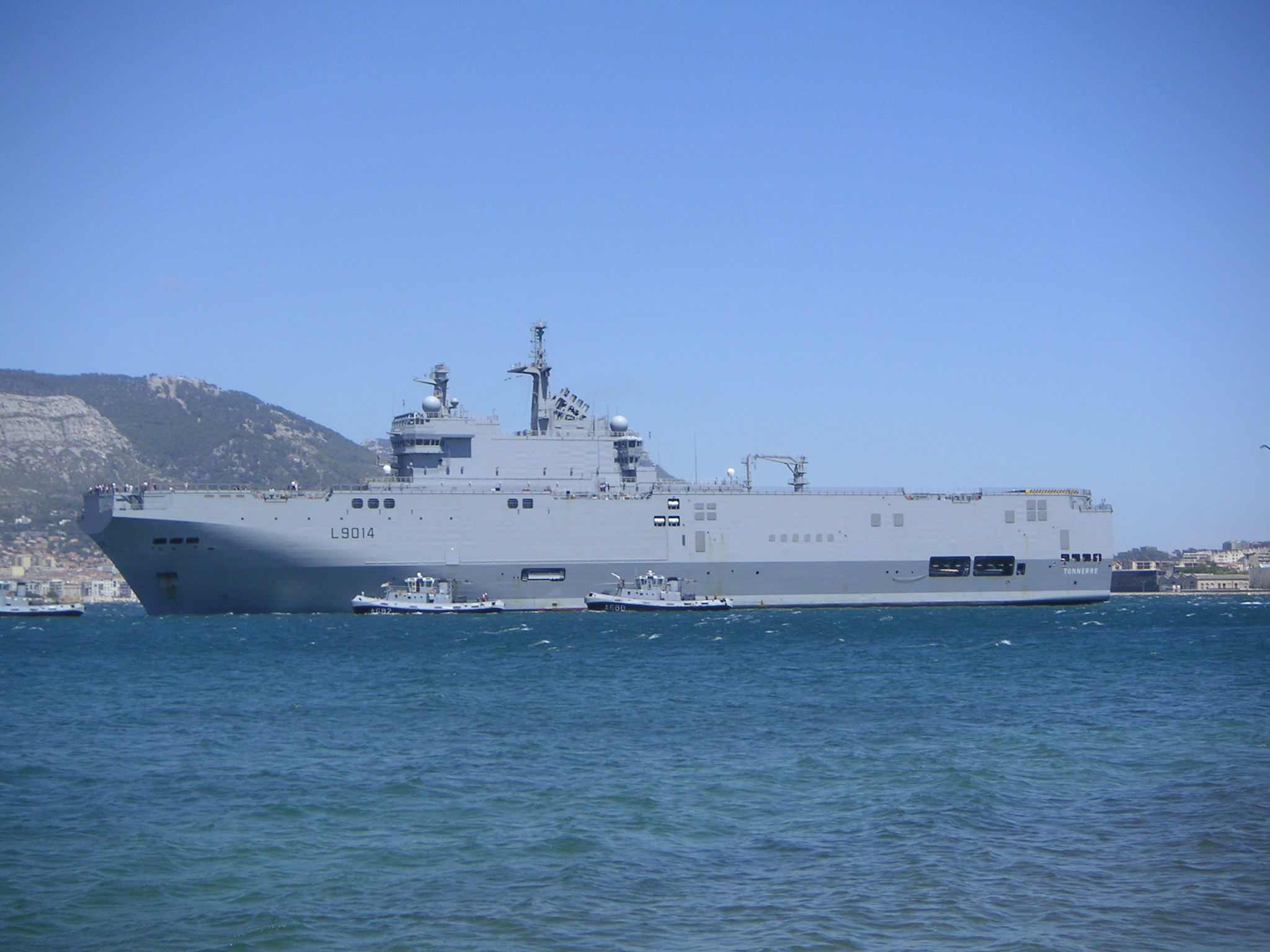 Le Tonnerre, bâtiment de projection et de commandement (BPC)